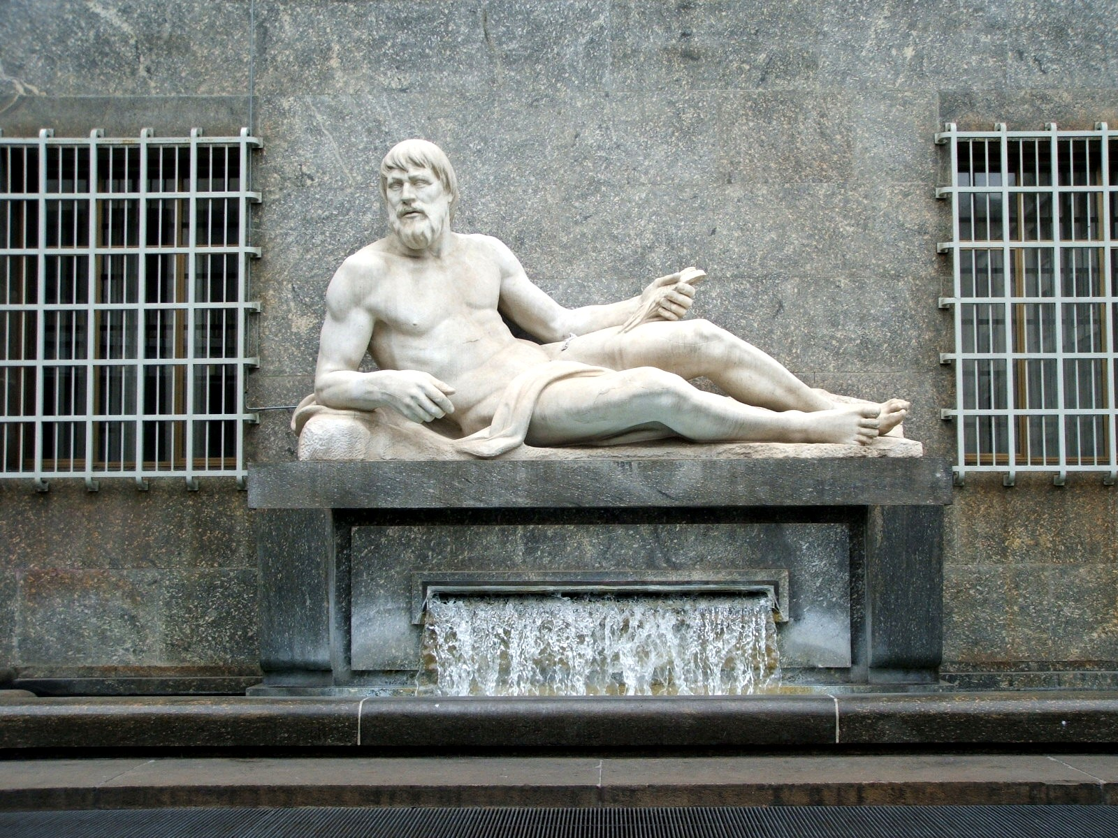 Statua raffigurante il fiume Po, piazza CLN, Torino (Piemonte, Italia)